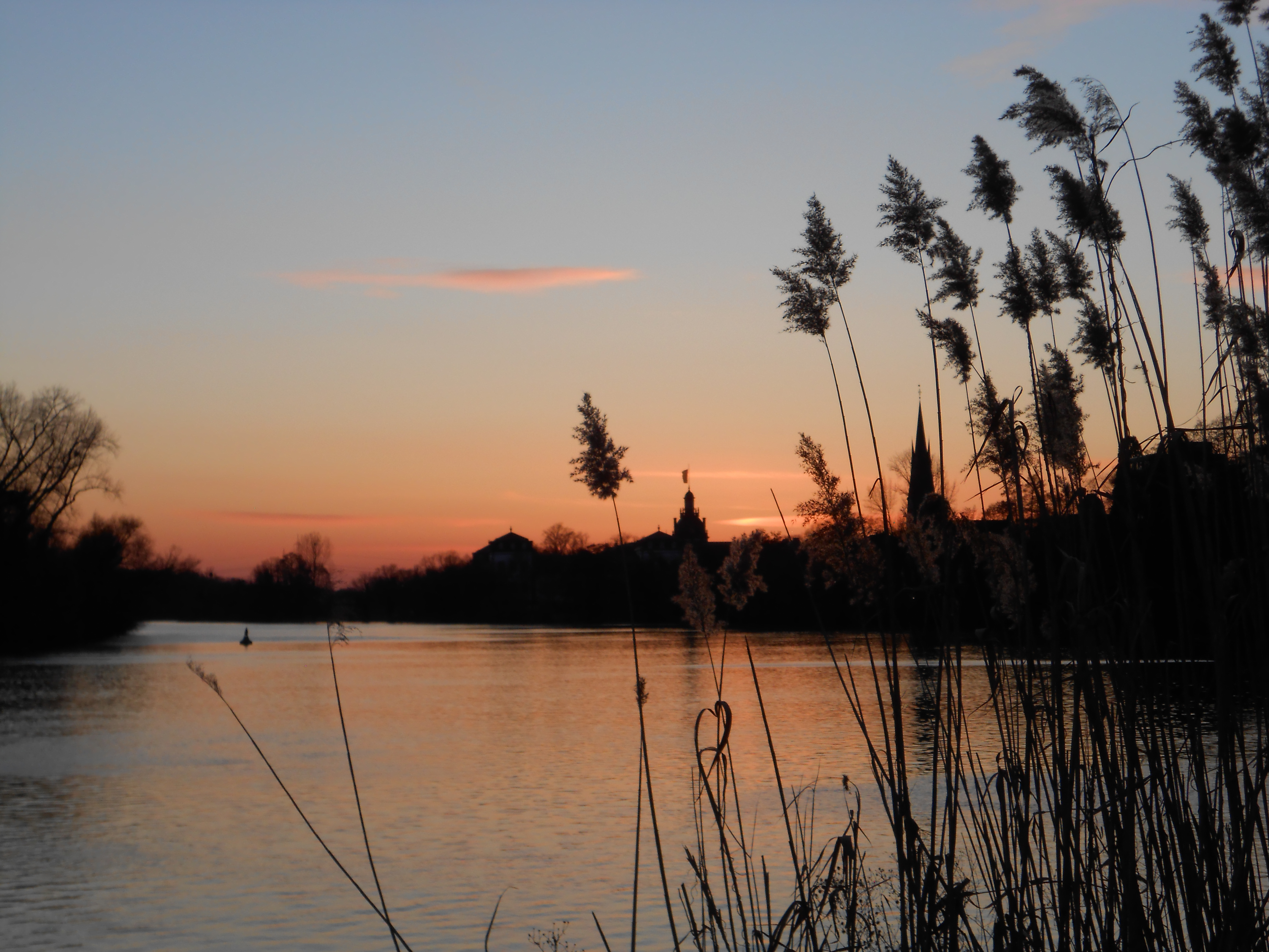 Abendstimmung an der Mündung der Kinzig in den Main mit Blick nach Kesselstadt